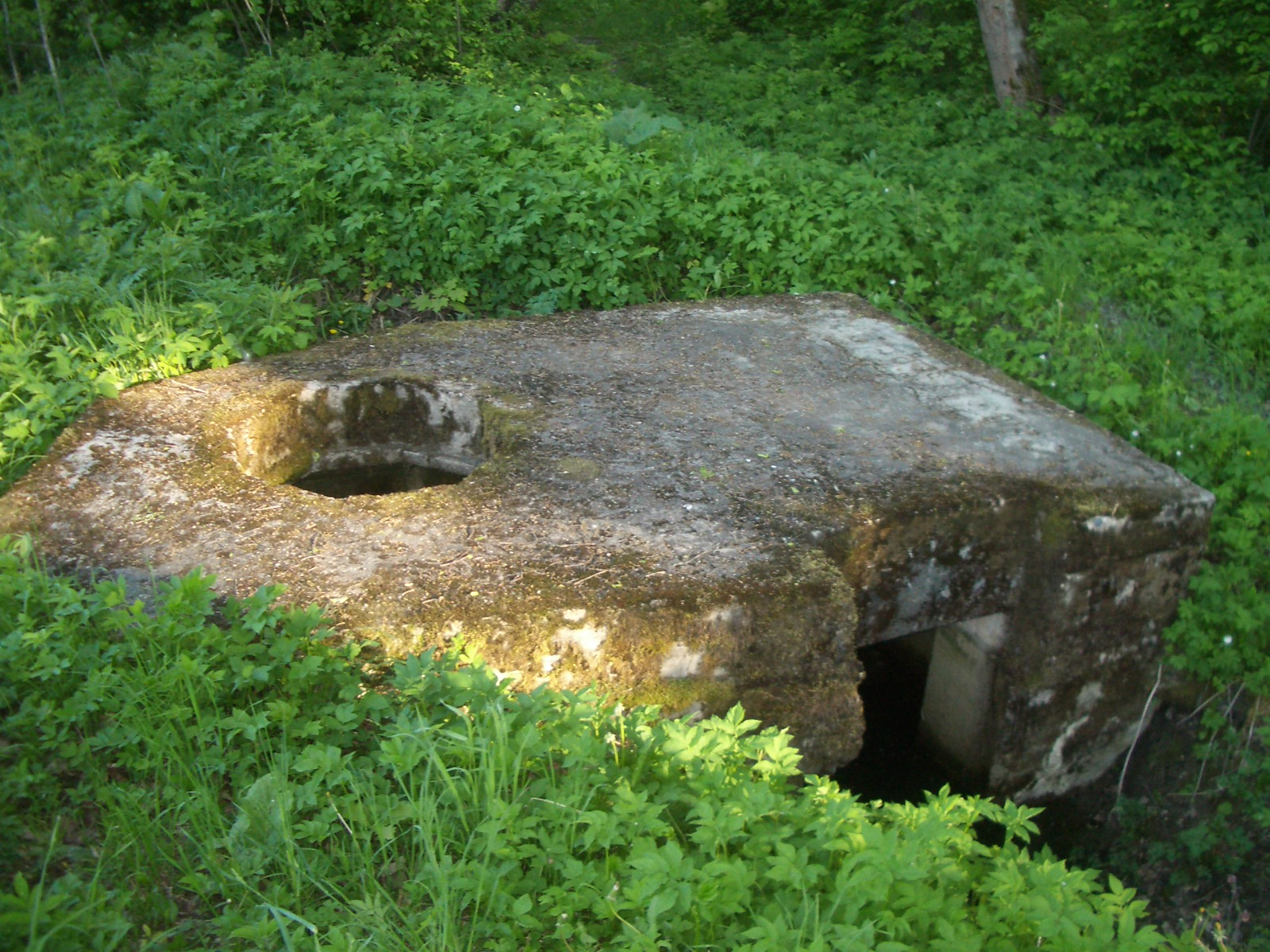 ДОТ типа тобрук в Александровском парке в Пушкине (Санкт-Петербург)